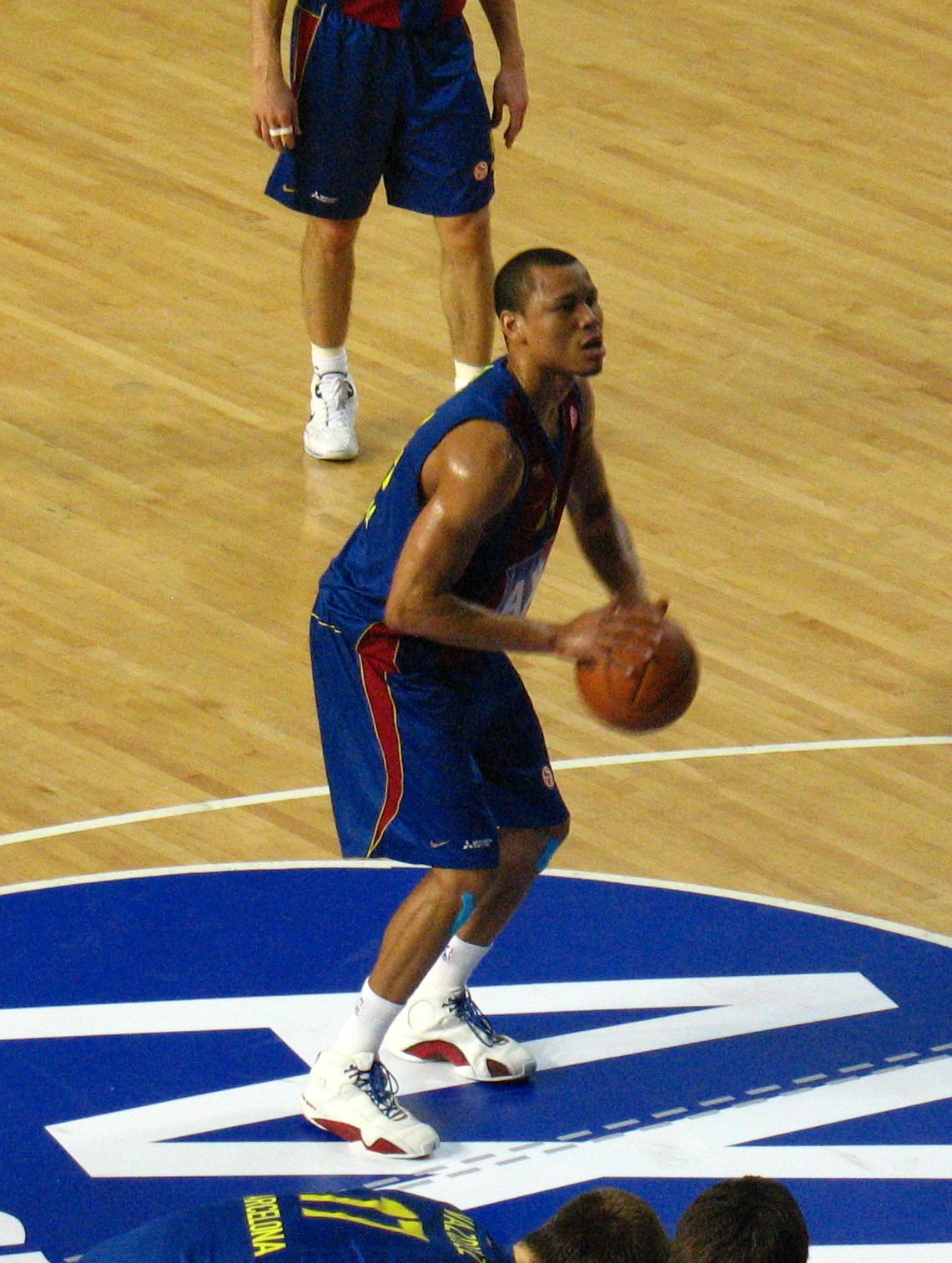 Alex Acker en un partido con el Barcelona en Febrero de 2008